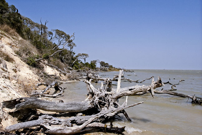 Břeh moře v Texasu